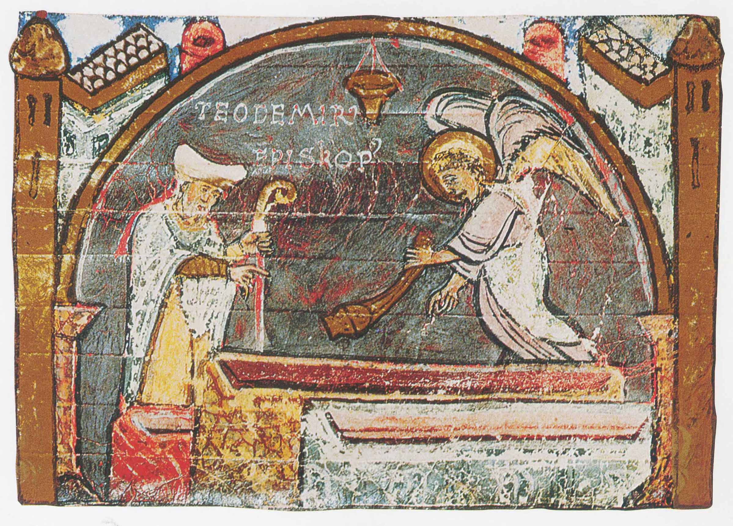 Miniatura do Tombo A da Catedral de Santiago de Compostela (ca. 1129-1134), representando o bispo Teodomiro no momento do descubrimento dos restos do Apóstolo no monte Libredón.